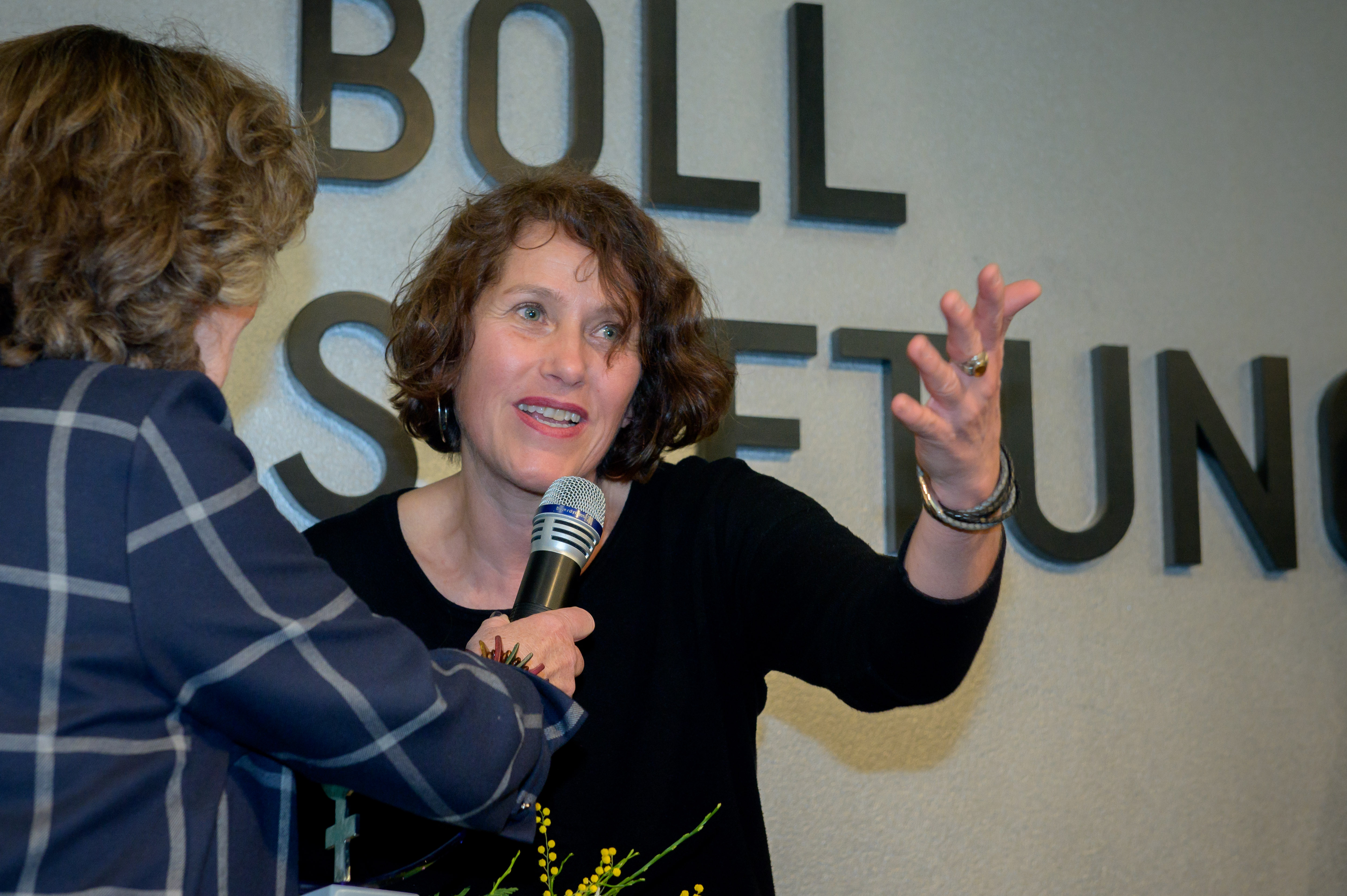 Nora Szász (Ärztin) Foto: Stephan Röhl